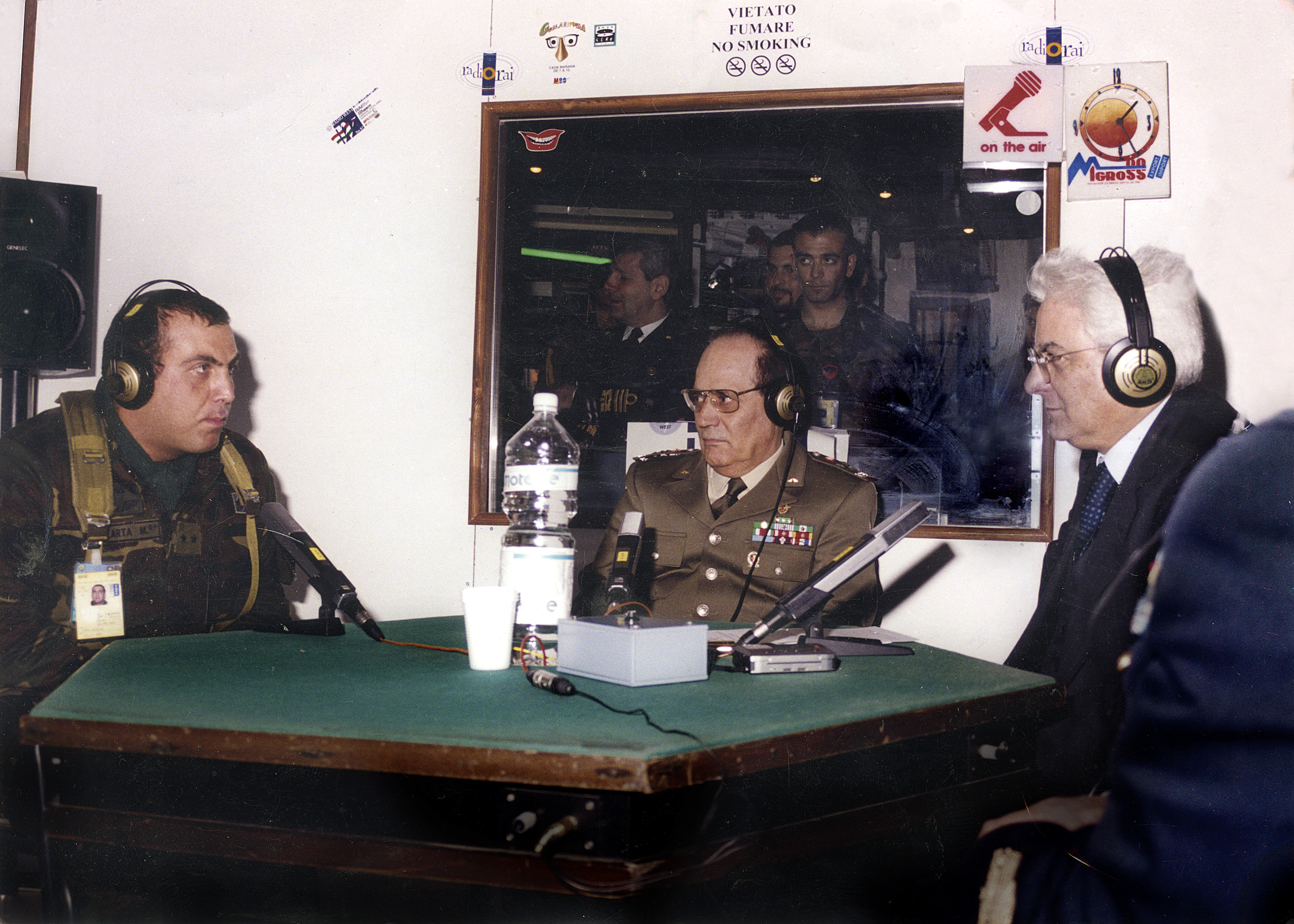 Il Ministro della Difesa dell'epoca Sergio Mattarella intervistato dal direttore di Radio West Massimo Carta